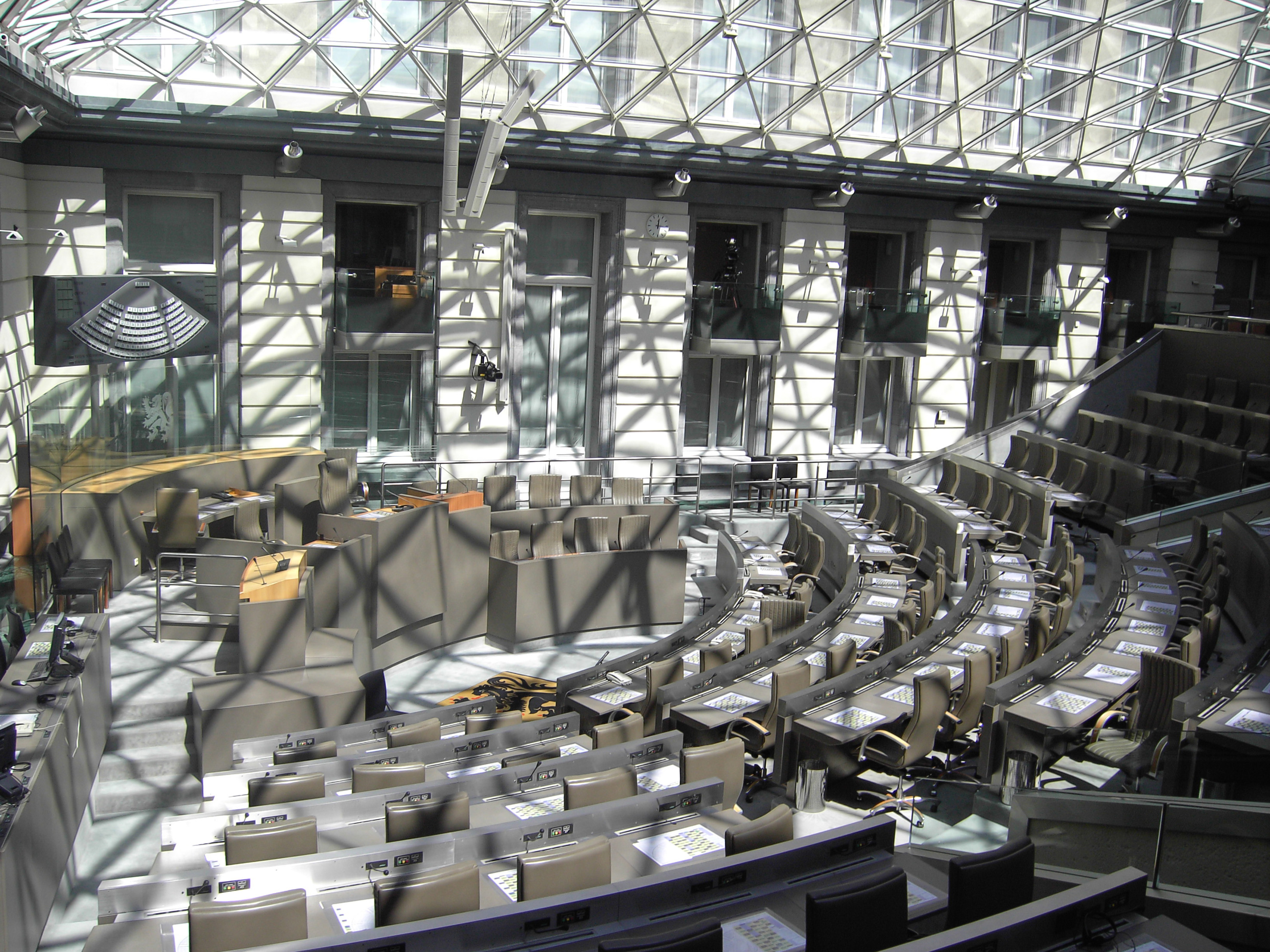 Brussels - Vlaams Parlement - Plenum